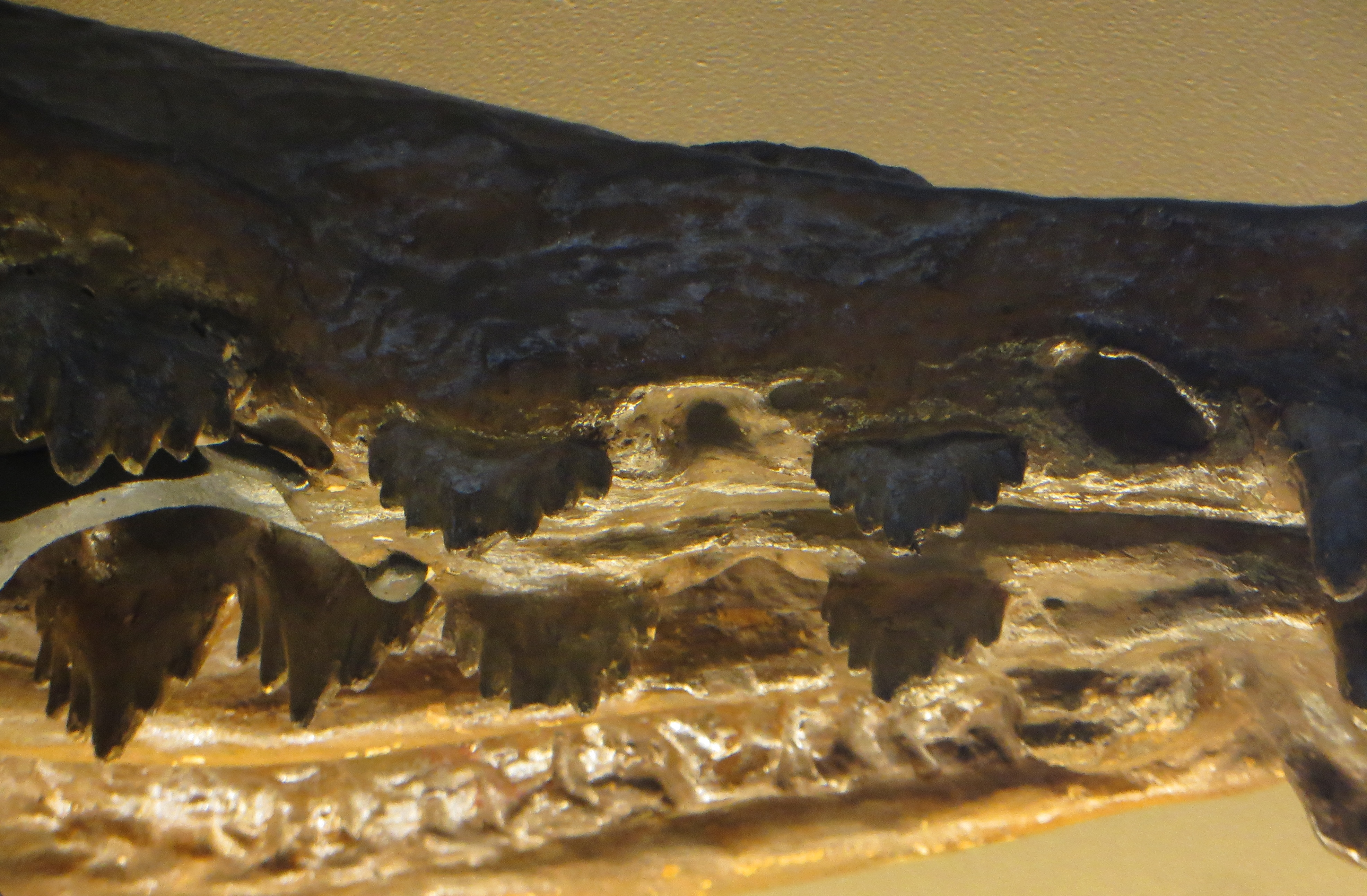 Squalodon fossil teeth